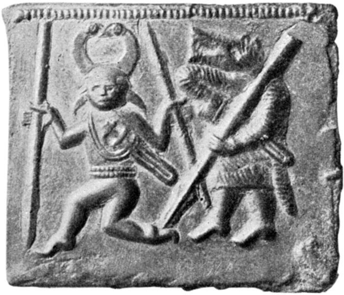 En hjälmbleckspatris med en vapendansare och en björnkrigare från Björnhovda, Torslunda socken, Algutsrums härad, Mörbylånga kommun, Öland, Kalmar län, Sverige. Fig. 1 ur artikeln "Hjälmar och svärd i Beovulf" av Knut Stjerna ur en festskrift till Oscar Montelius utgiven 1903.